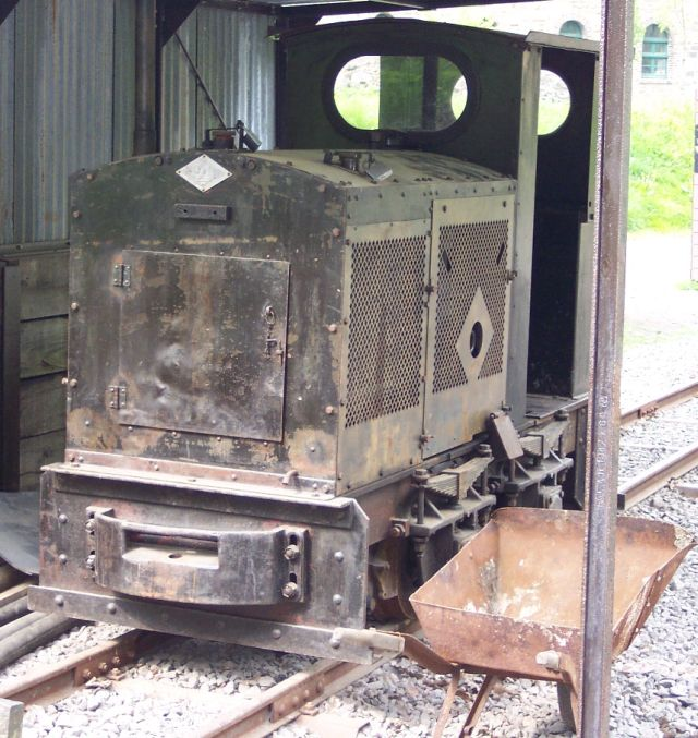 Orenstein & Koppel-Feldbahnlokomotive, Muttental, Witten